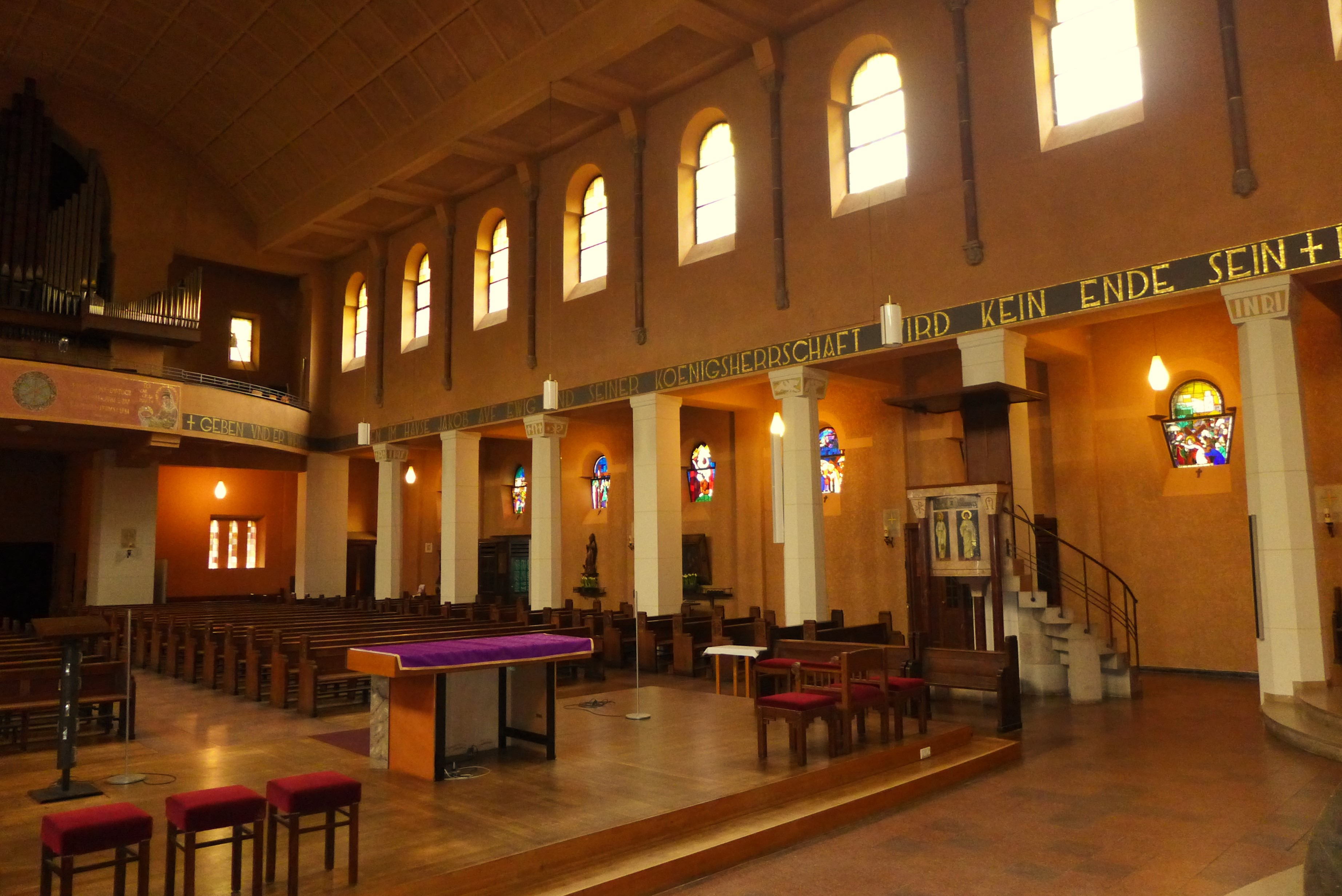 Christkönig-Kirche (Saarbrücken), linke Mittelschiffarkade